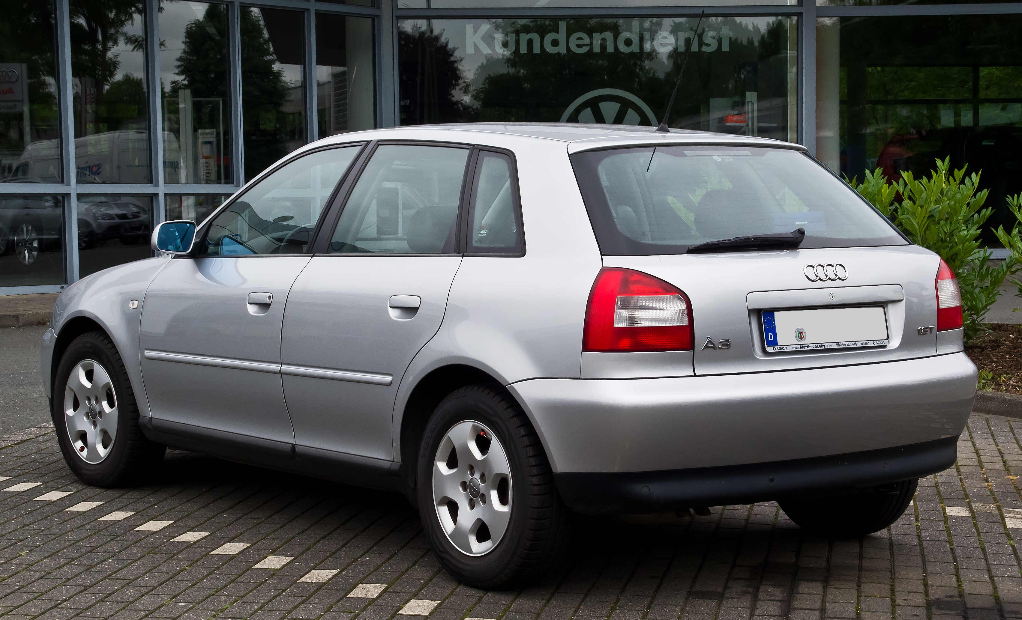 Audi A3 1.8 T (8L, Facelift)